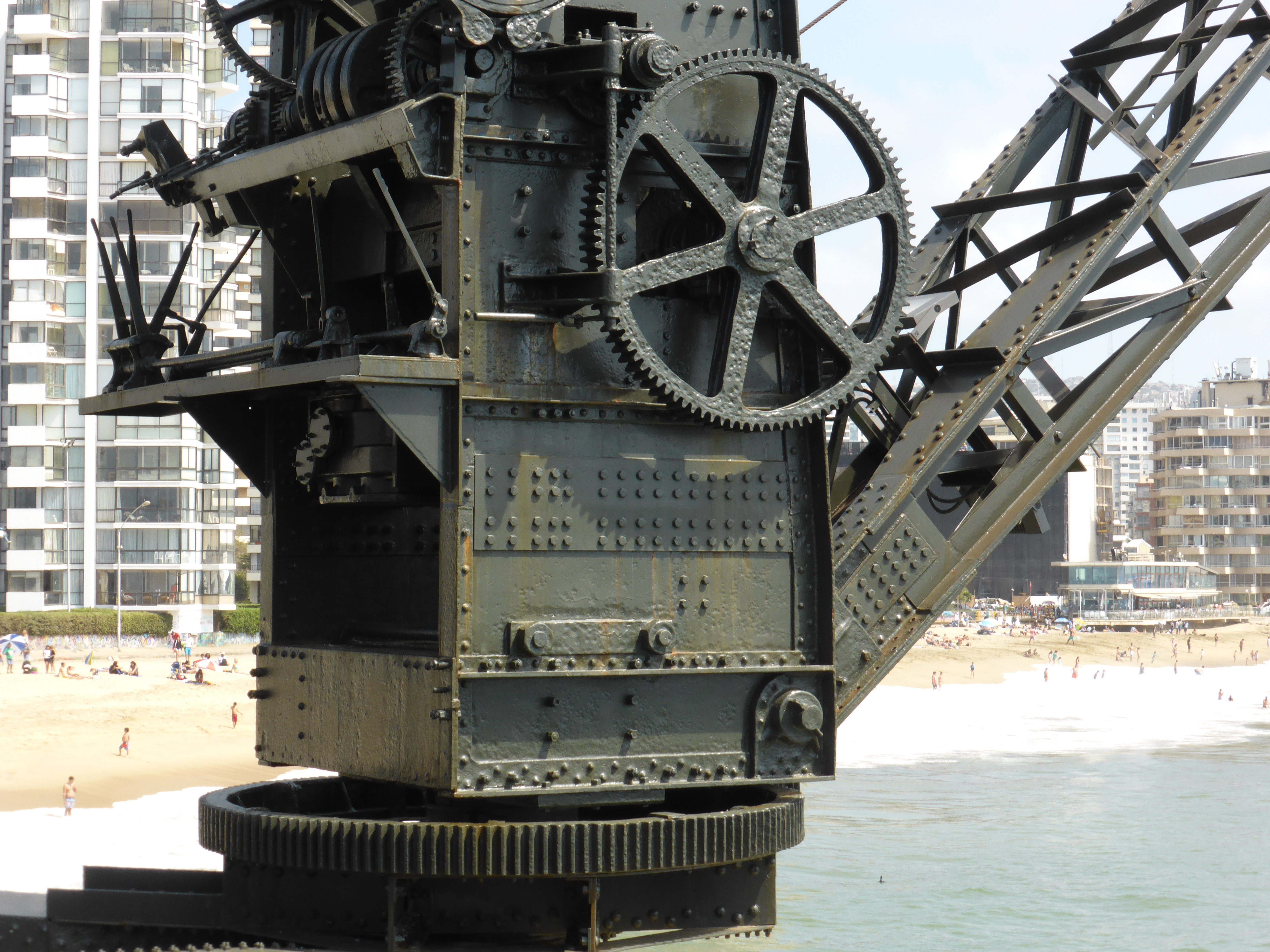 El Muelle Vergara fue reparado en el año 2016, por el Ministerio de Obras Públicas. Es un muelle histórico, que sirve como mirador y paseo peatonal. Es un icono turístico. El muelle se empezó a construir en 1894.